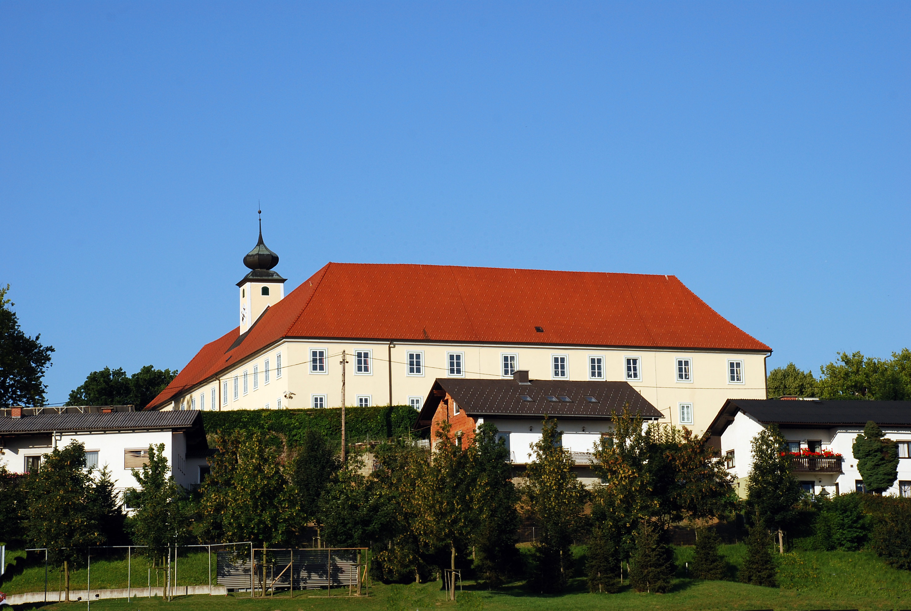 Schloss Lannach, Steiermark